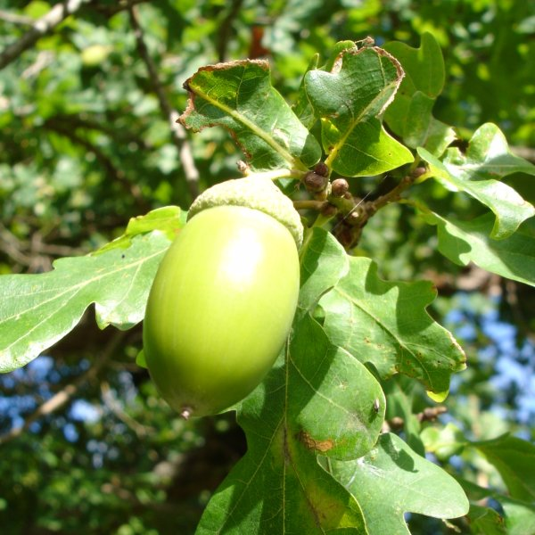 gland de chêne rouvre, au mois d'août, région de Vichy (Auvergne, France).